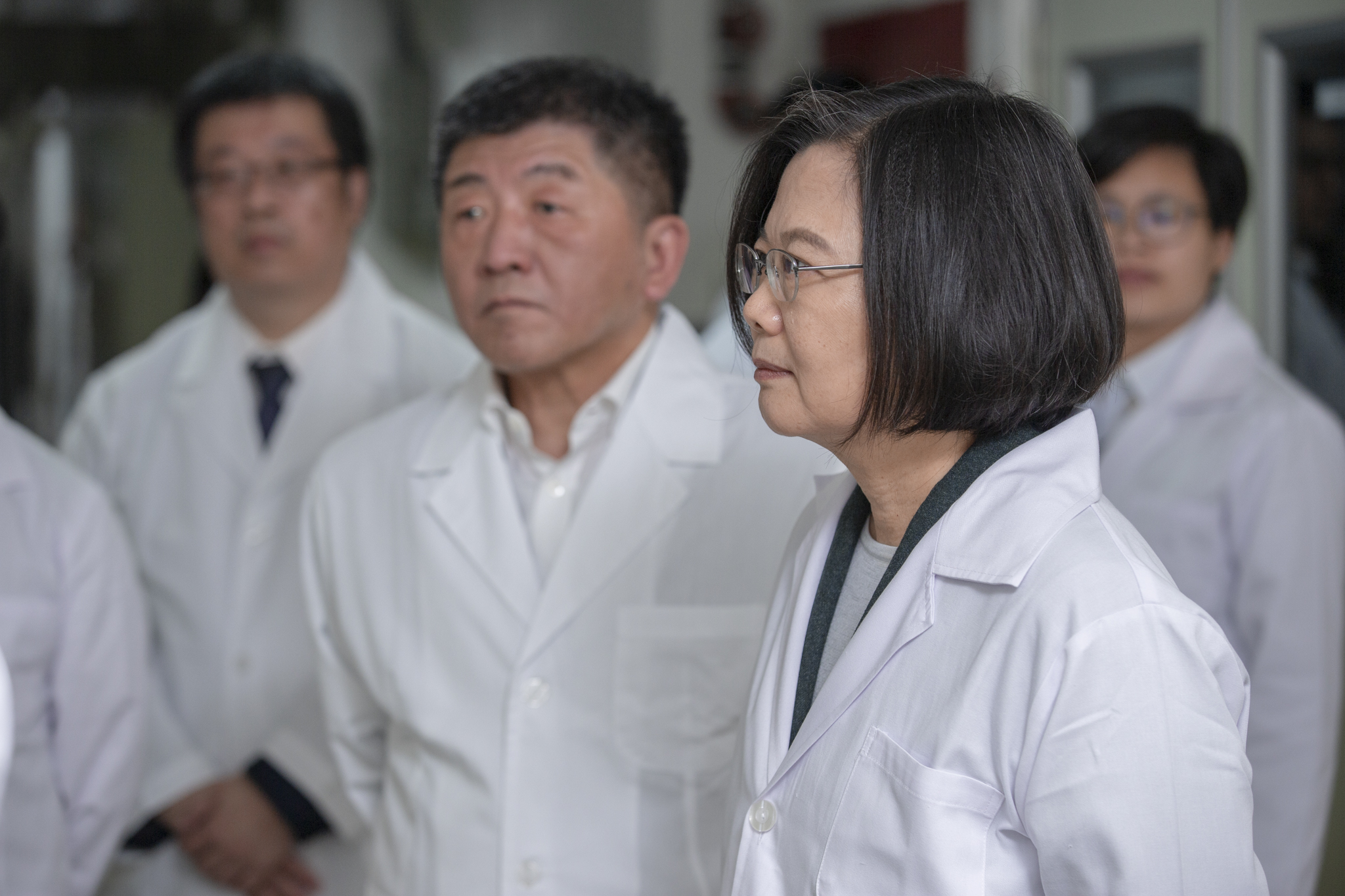 03.19 總統視察衛生福利部疾病管制署檢驗及疫苗研製中心-嚴重特殊傳染性肺炎檢驗實驗室